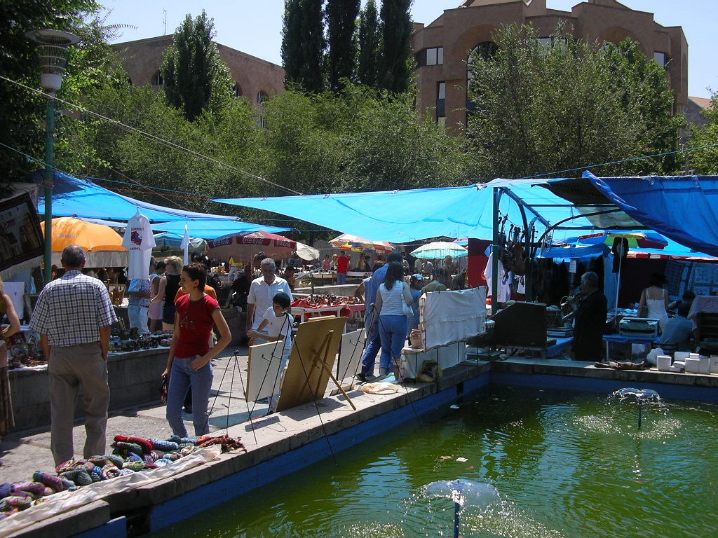 Erevan, Vernissage